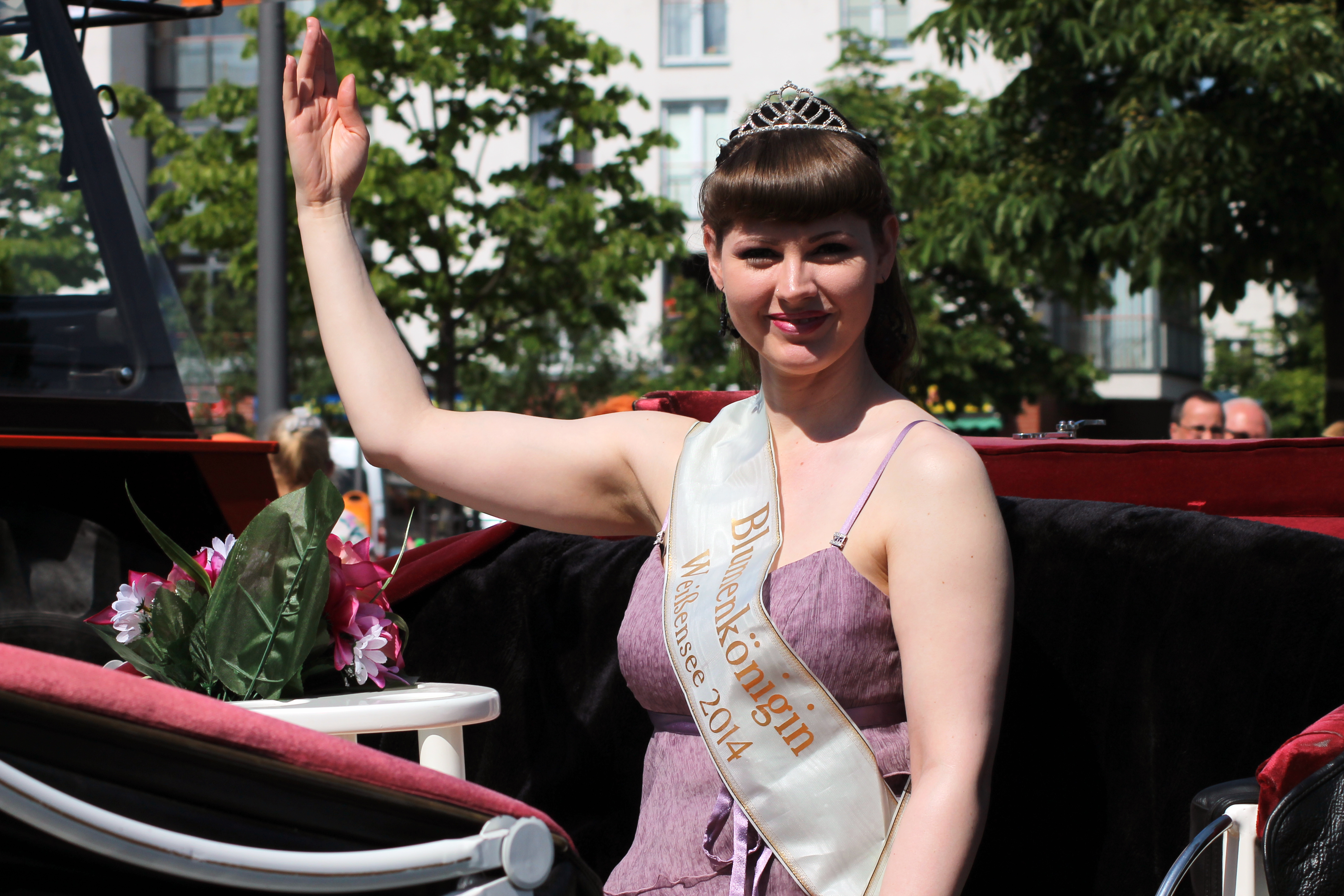 Verena Berthold ist die Weißenseer Blumenkönigin 2014/2015 bei dem Buchholzer Festtage 2015 Umzug in Berlin-Französisch Buchholz